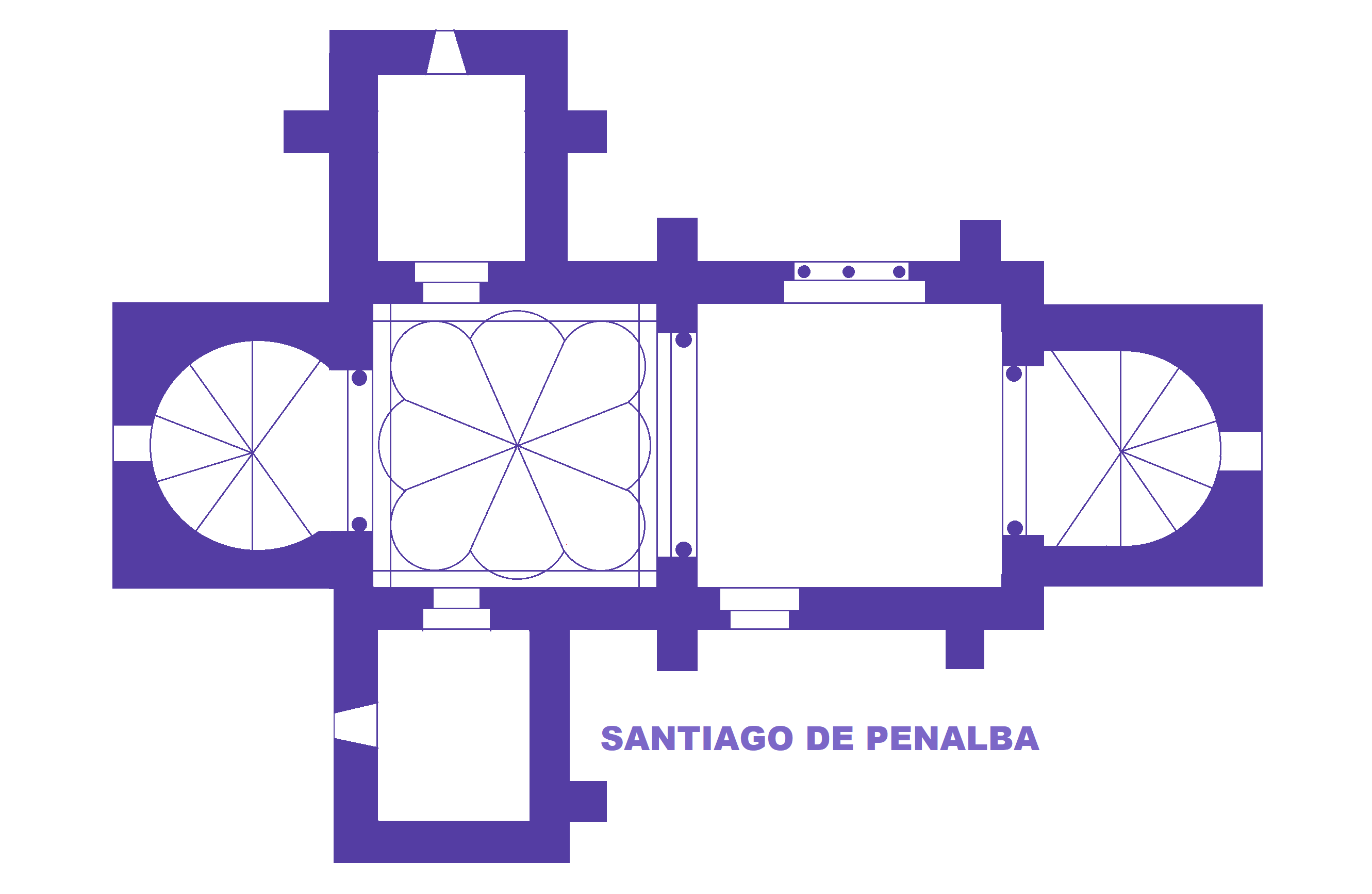 Eglise Santiago de Penalba, Espagne, Plan